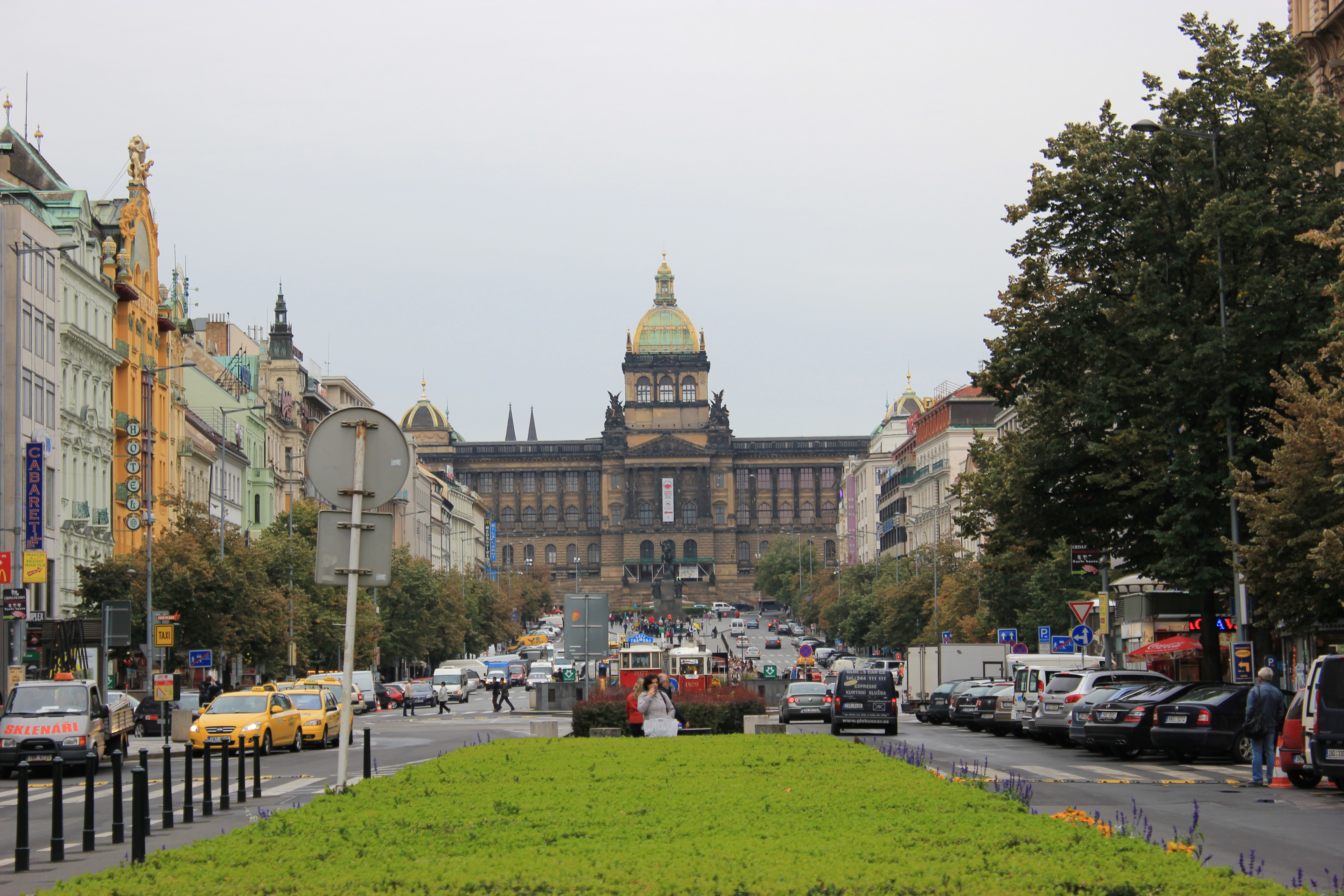 Plaza de Wenceslao